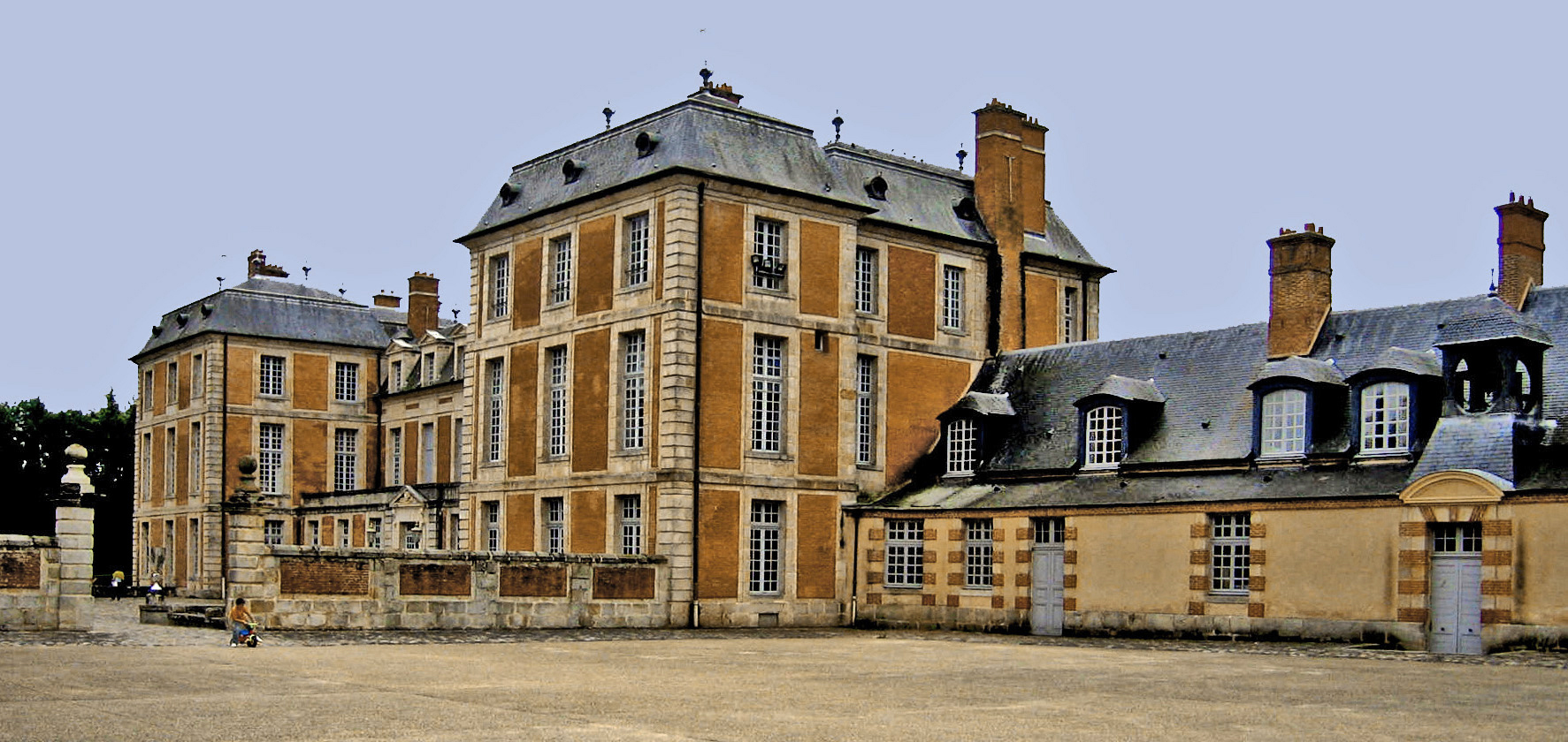 Le Château de Chamarande (Essonne).